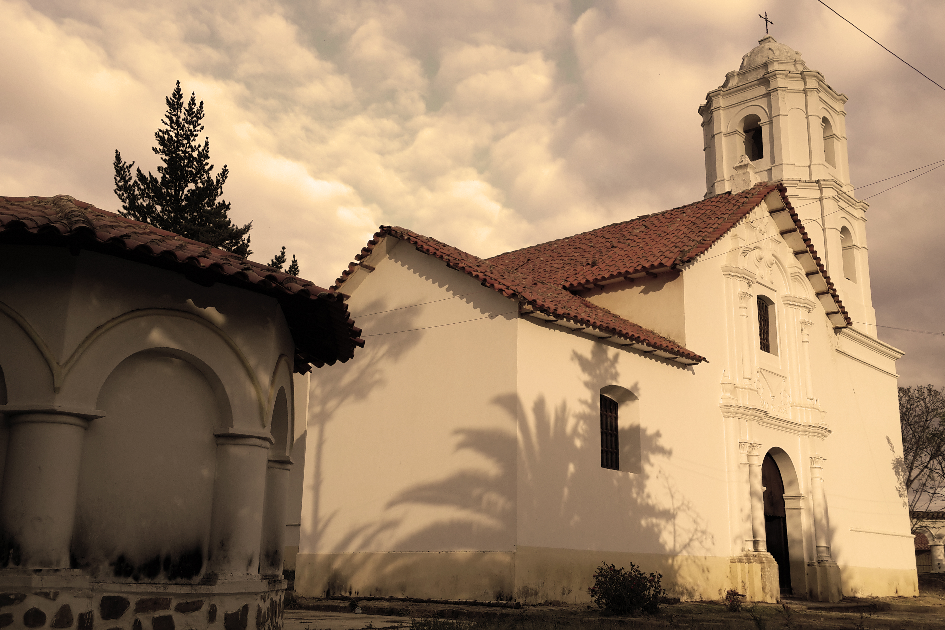 Templo de Tomina (Casa parroquial) This medium shows the protected monument with the number H/00-021 in Bolivia.